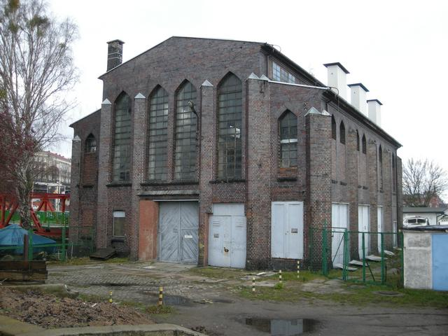 Podstacja transformatorowa do zasilania trakcji tramwajowej w Szczecinie, Wyspa Jaskółcza